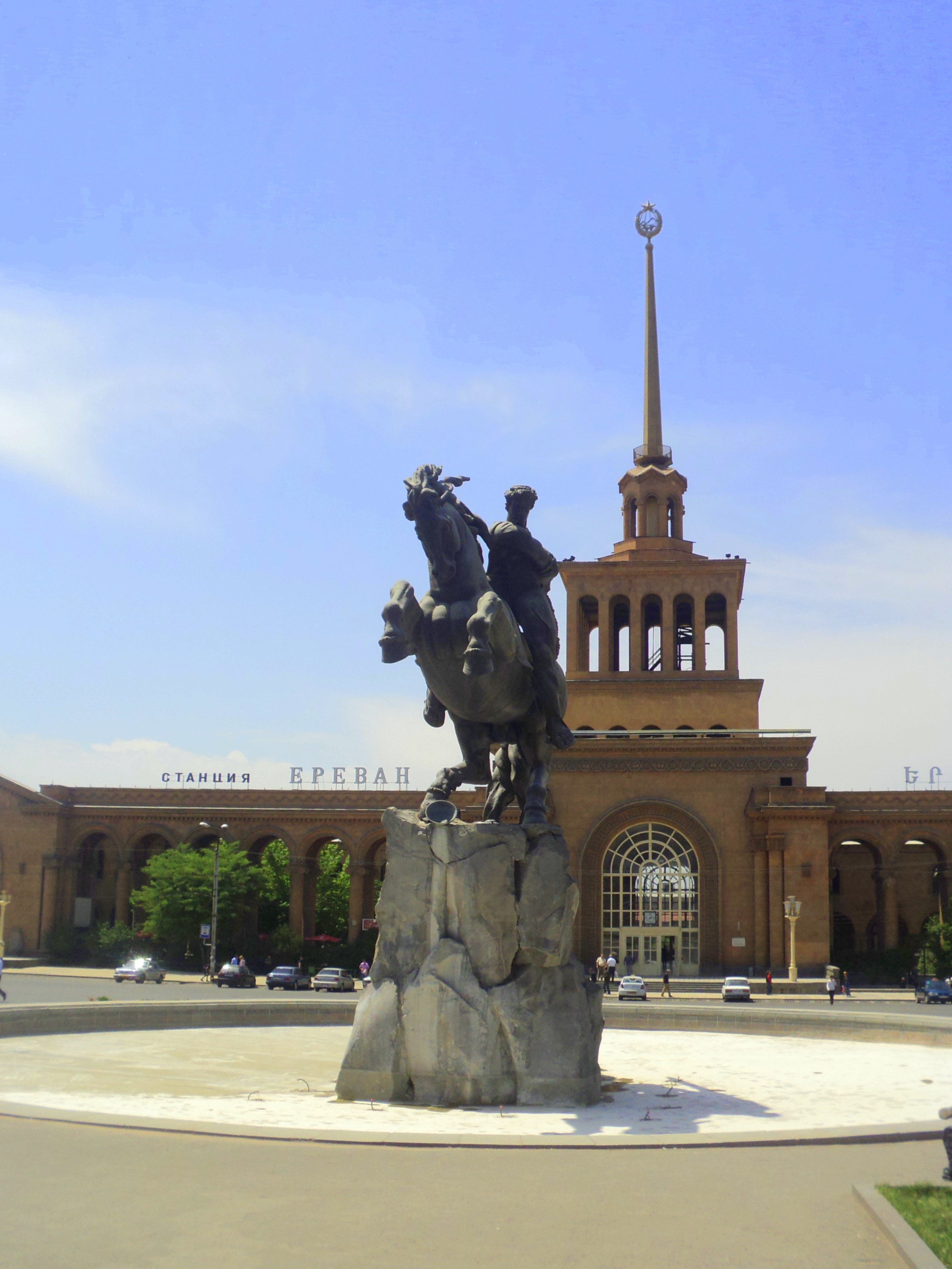 Սասունցի Դավիթ-Հայտնի հայ ժողովրդական, դյուցազնական «Սասնա ծռեր» էպոսի հերոս , Հեղինակ`Երվանդ Քոչար, Ճարտարապետ`Միքայել Մազմանյան,կոփածո պղինձ և բազալտ Տեղադրման տարեթիվ - 1959 Գտնվում է Սասունցի Դավթի հրապարակում, երկաթուղային կայարանի առջև, փոխարինել է 1939 թվականից տեղադրված գիպսե տարբերակին: 5/16